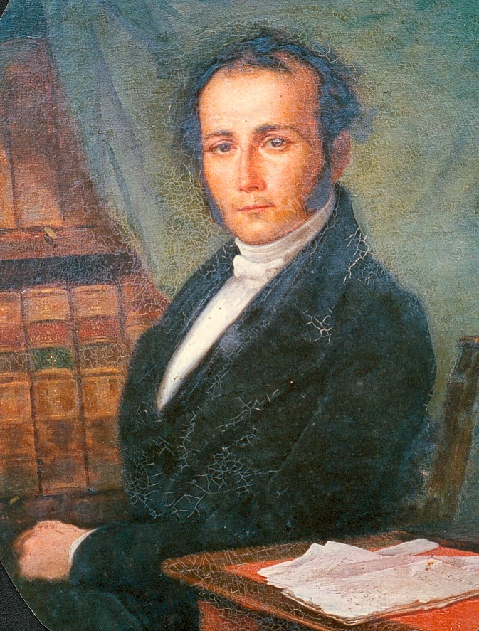 Portrait d'Adrien d'Épinay (1794-1839)